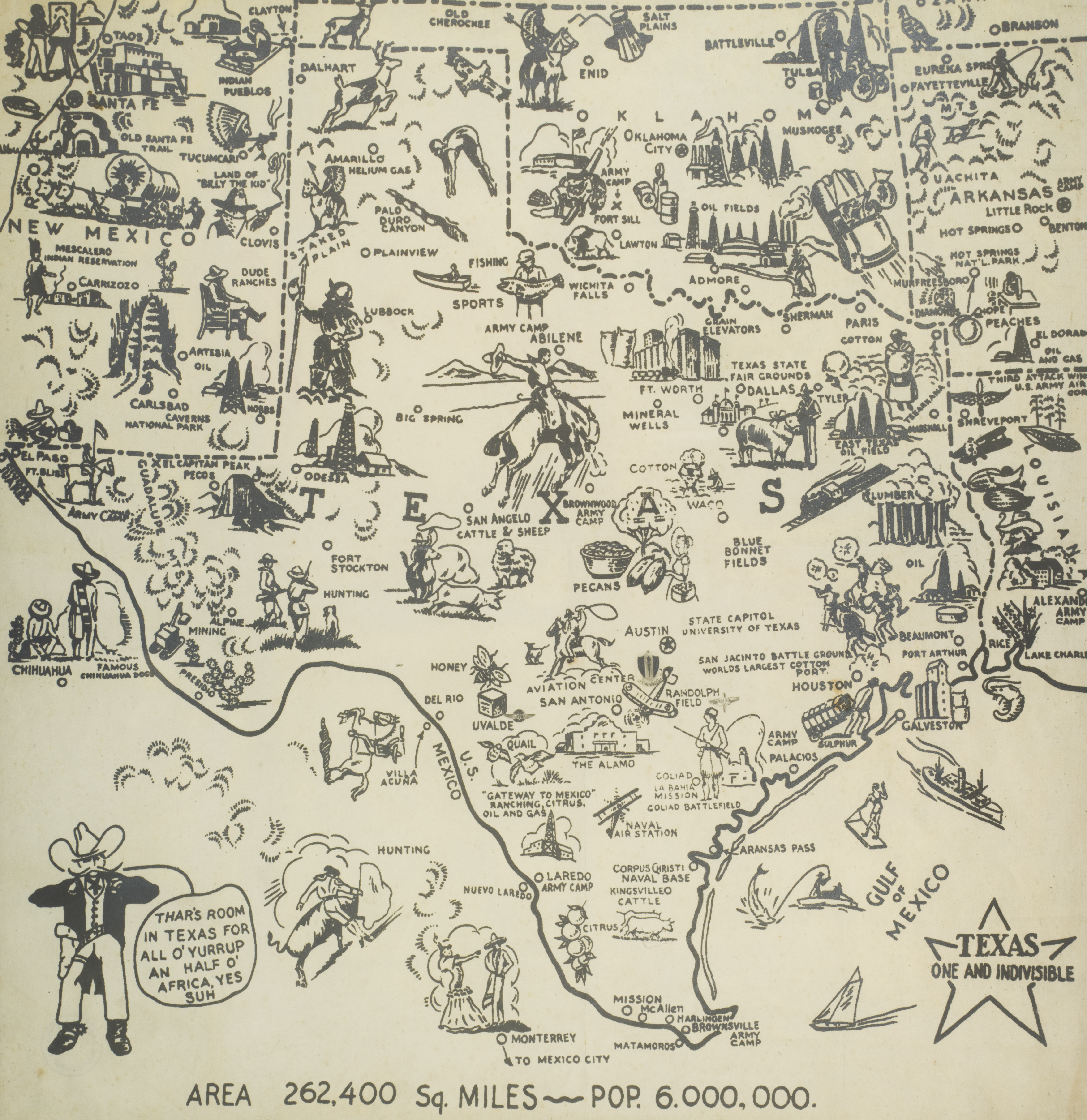 Obra que integra o acervo do Museu Paulista da USP. Coleção João Baptista de Campos Aguirra